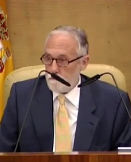 Luis de Velasco Rami.